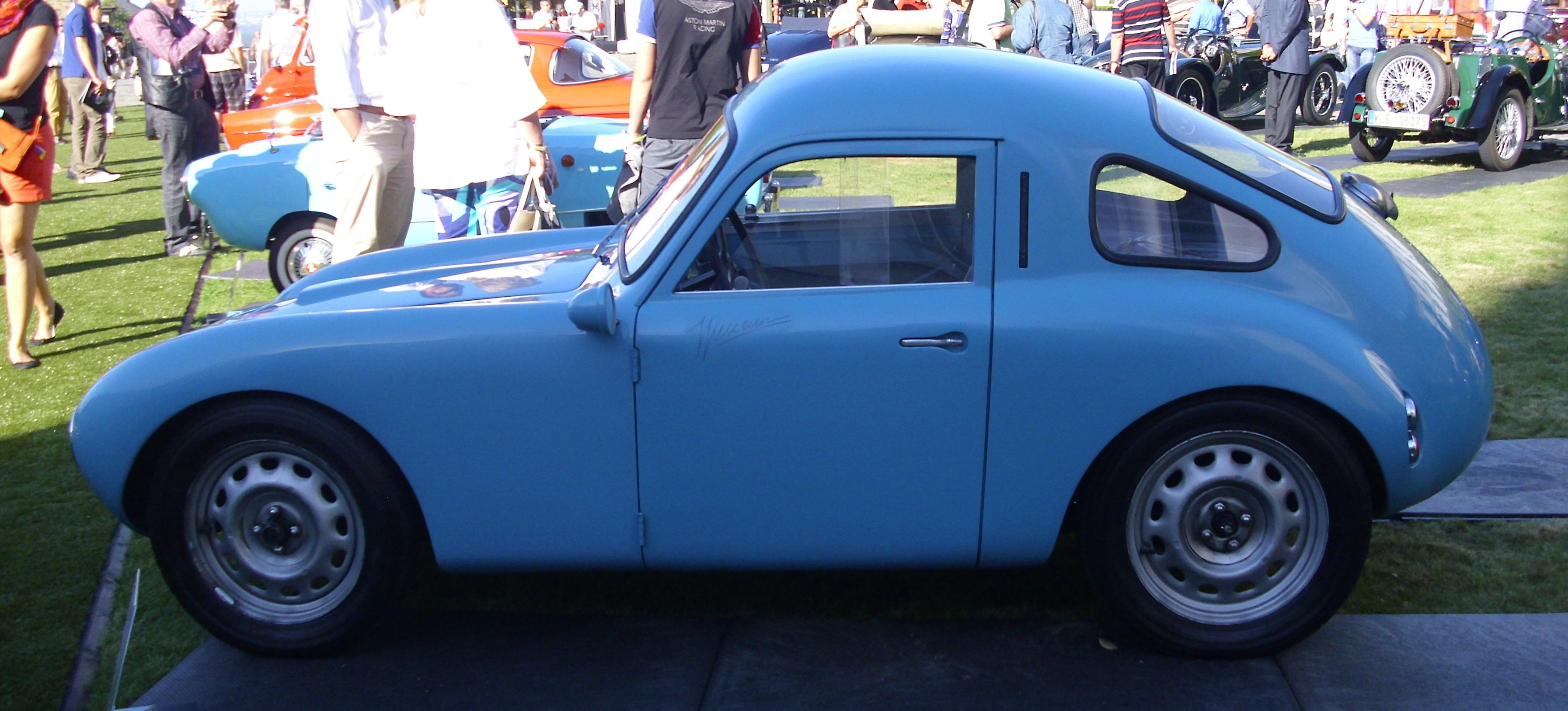 Bizzarrini 500 “Macchinetta” 1952